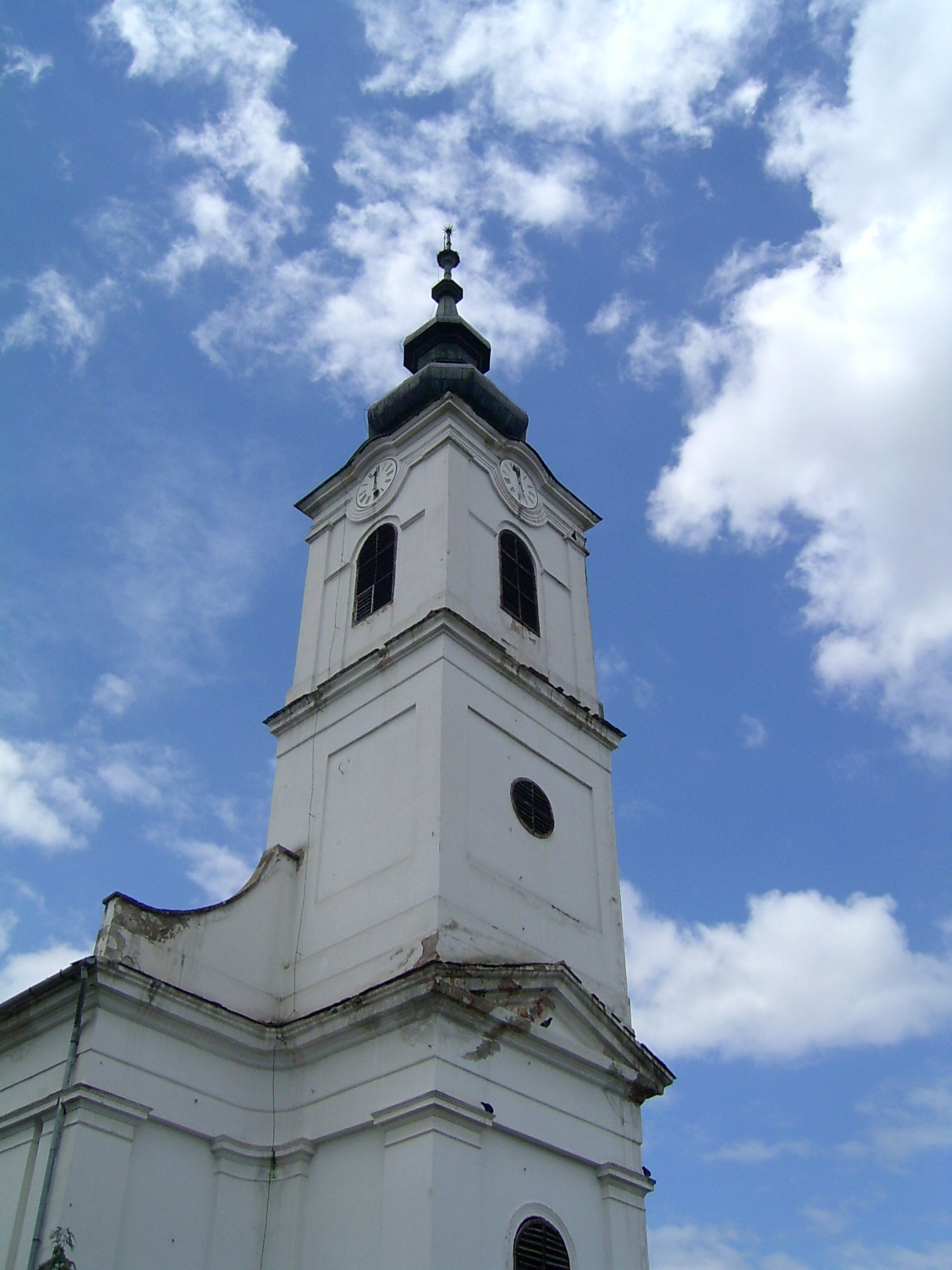 Mezőcsokonya ref. templom